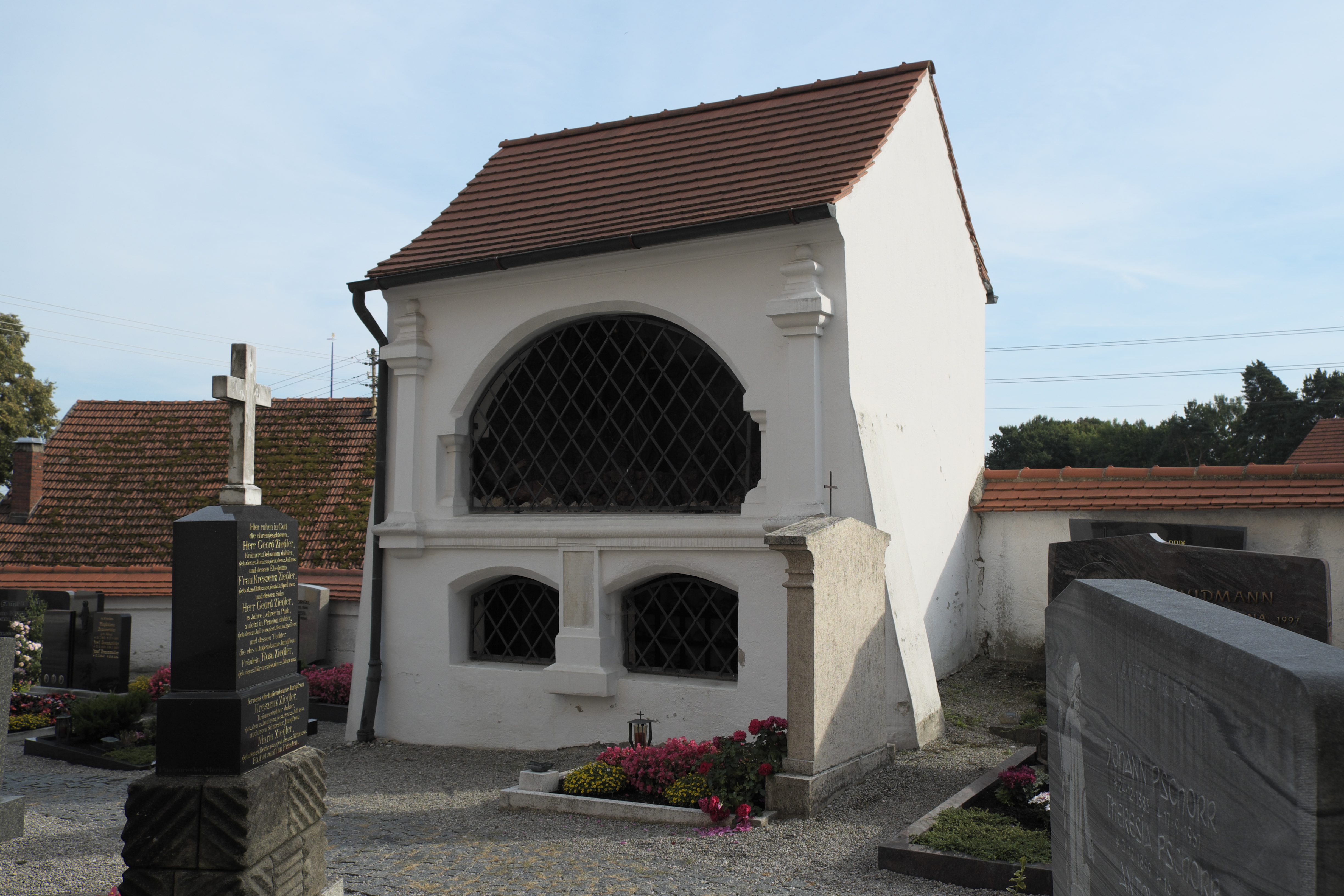 Beinhaus auf dem Friedhof der katholischen Pfarrkirche Mariä Himmelfahrt in Walleshausen, einem Ortsteil von Geltendorf im Landkreis Landsberg am Lech (Oberbayern/Bayern)